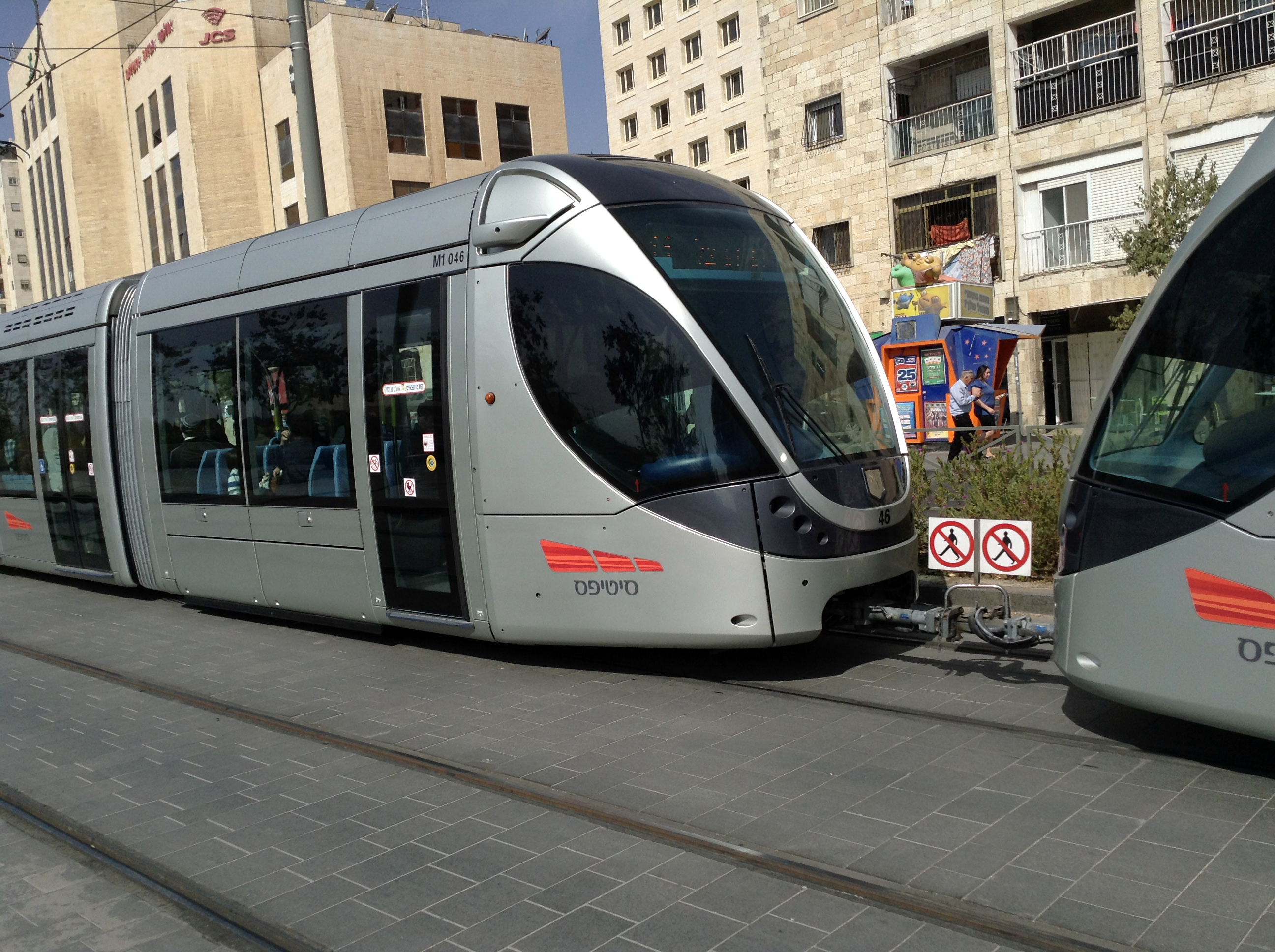 Иерусалимский трамвай на ул. Яффо.